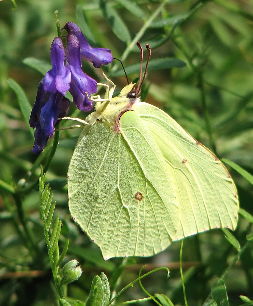 Beschreibung: Zitronenfalter / Brimstone (Gonepteryx rhamni) Fotograf: Darkone, 14. August 2005